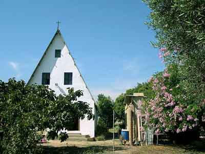 Barraca Valenciana - La Huerta (Valencia, España) Barraca Valenciana